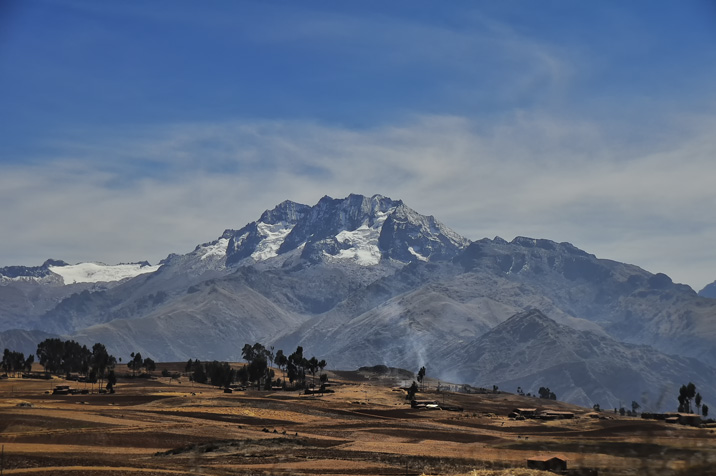 near Ollantaytambo